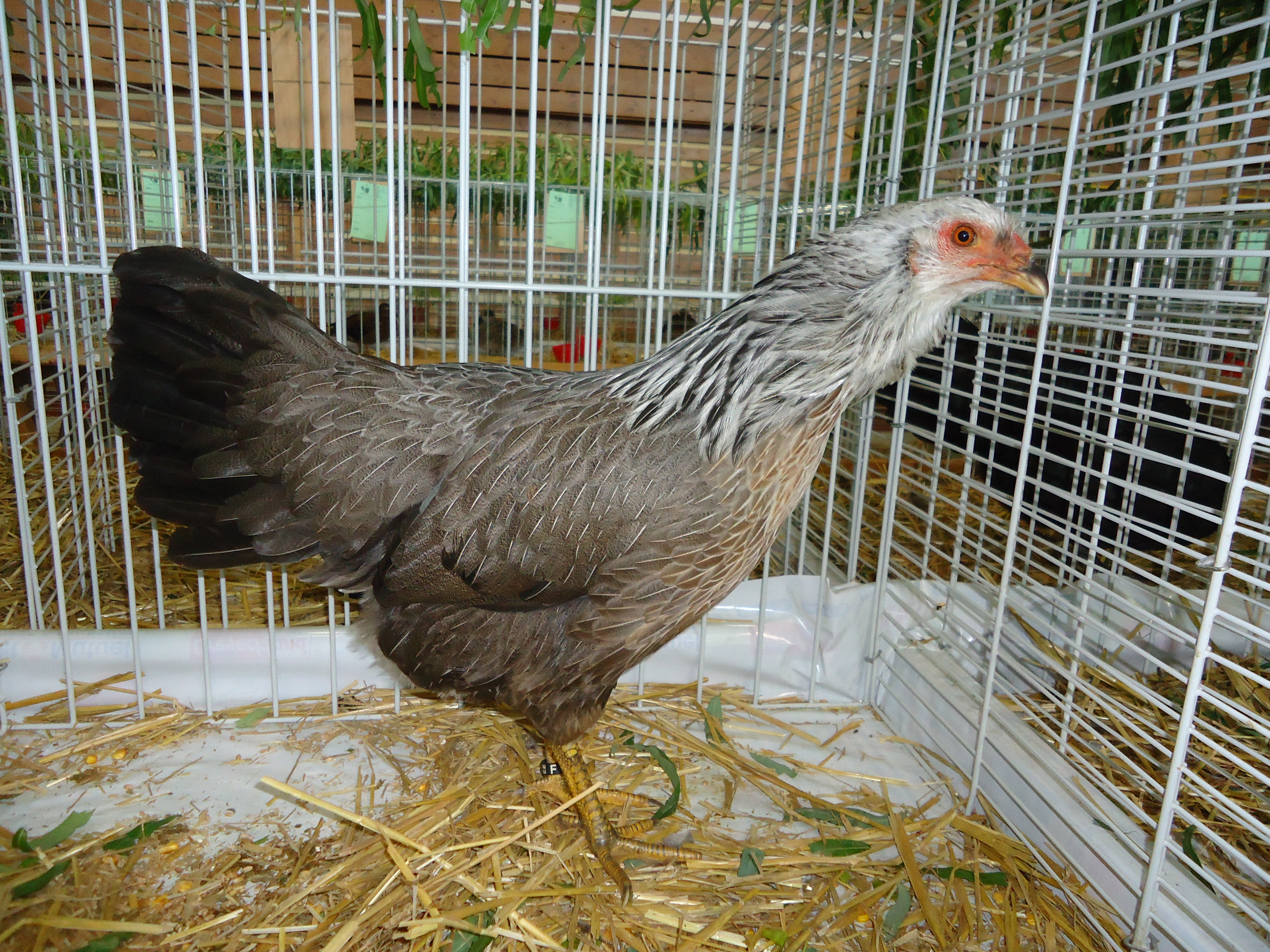 Poule